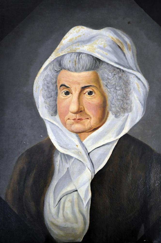 Rahel Amalia Augusta Trier, Stifterin des Trierschen Instituts, des Vorgängers der Universitätsfrauenklinik Leipzig Ausschnitt aus einem beschrifteten Gemälde in der Frauenklinik, entstanden vermutlich anlässlich der Eröffnung des ersten Trierschen Instituts 1810